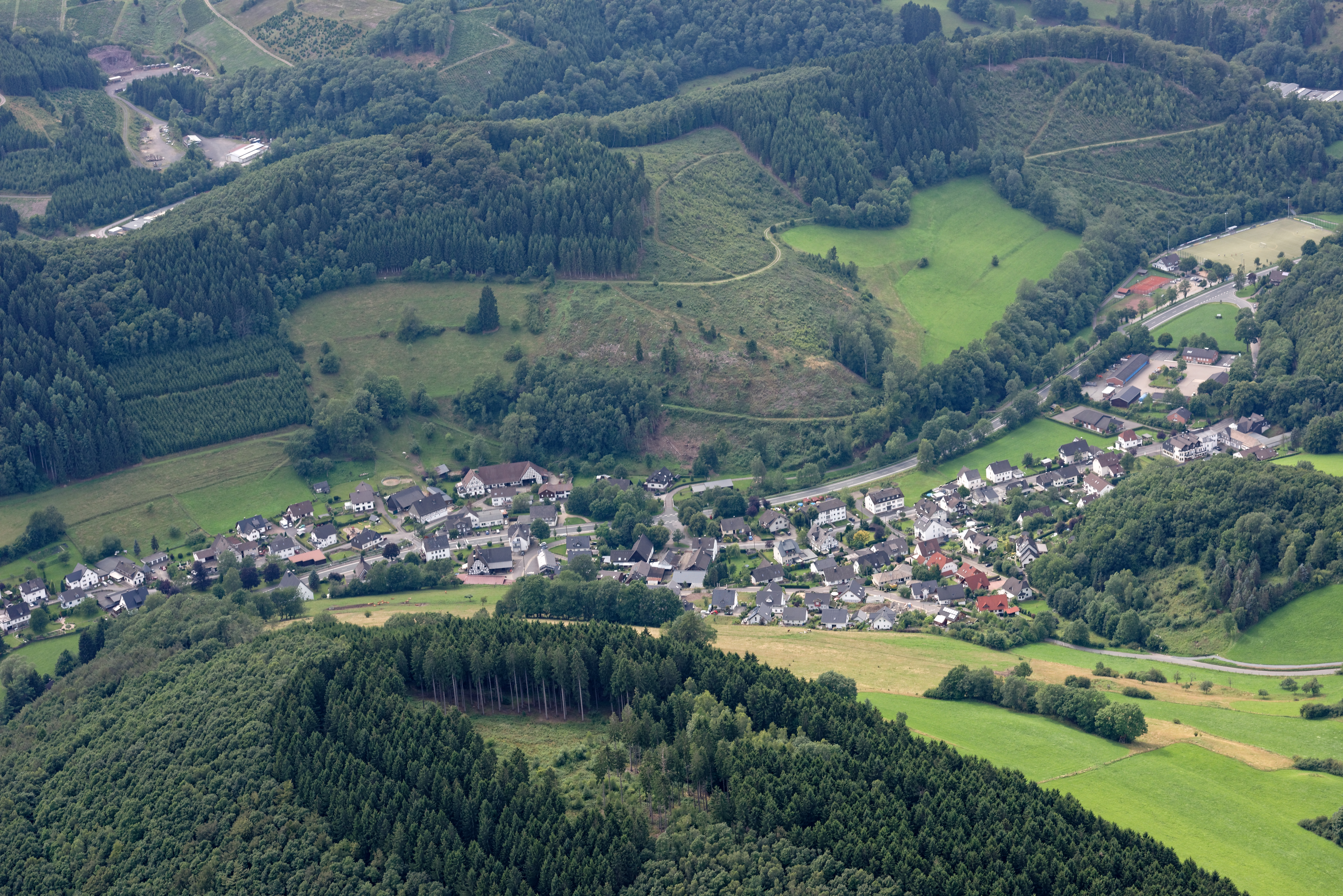 Luftaufnahme: Lennestädter Ortsteil Bonzel; Bundesstraße 55, Nordrhein-Westfalen